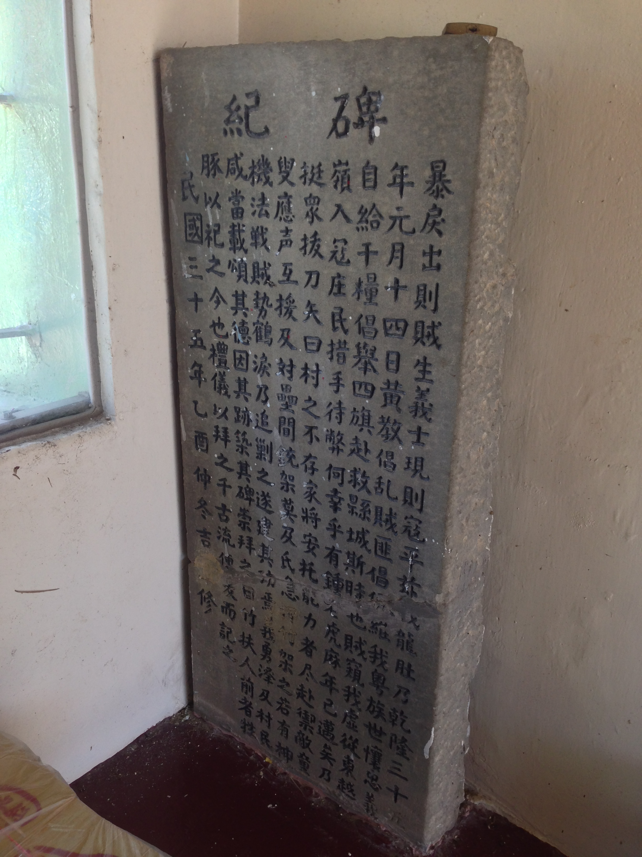 竹扶人壇碑記